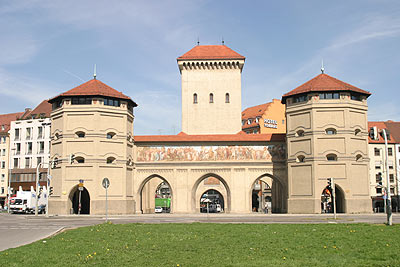 Isartor in Munich (Bavaria)